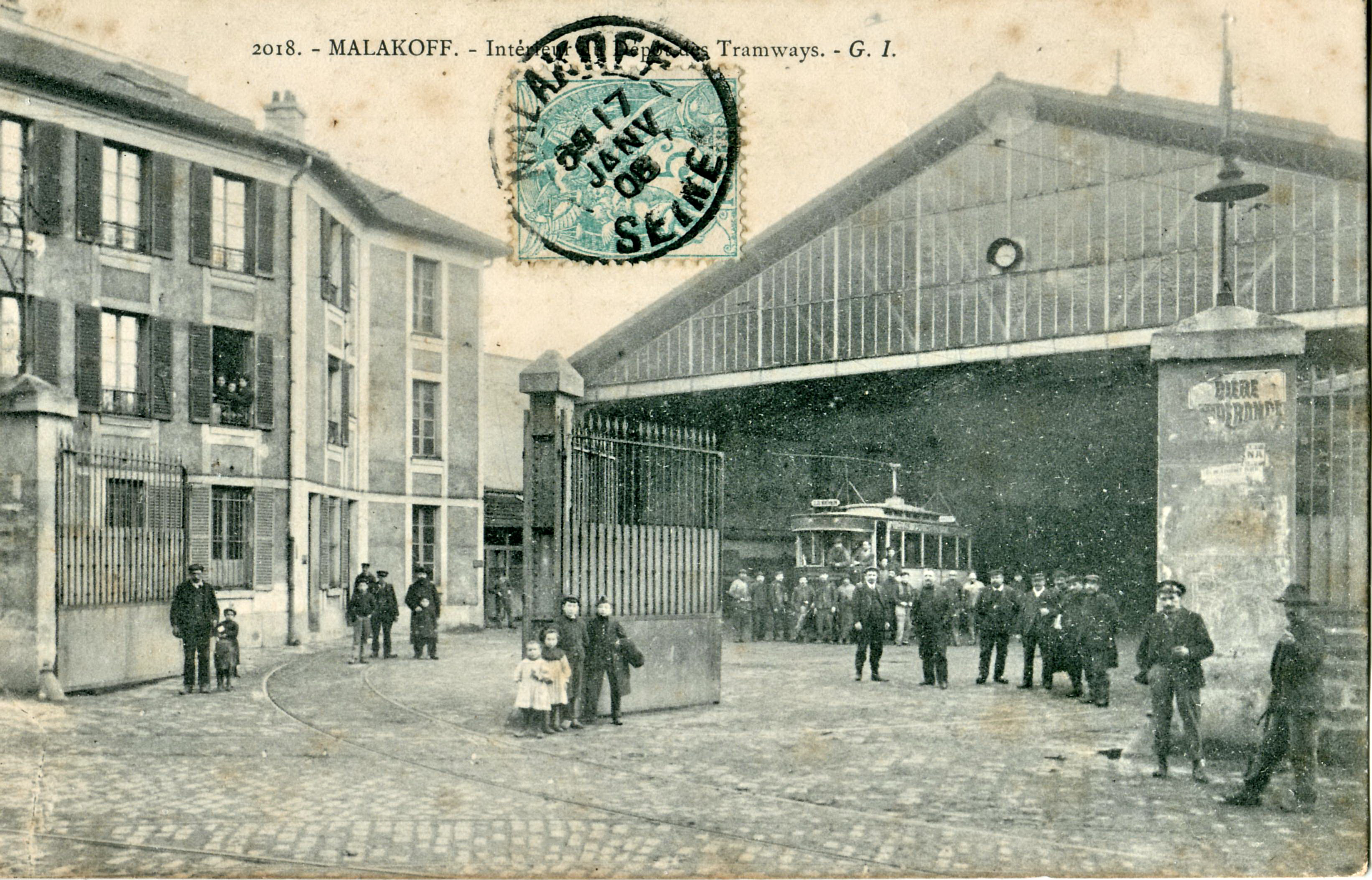 Carte postale ancienne éditée par GI, N° 2018Malakoff (Hauts-de-Seine) : Intérieur du dépôt des tramways (sans doute de la Compagnie générale parisienne de tramways (CGPT).